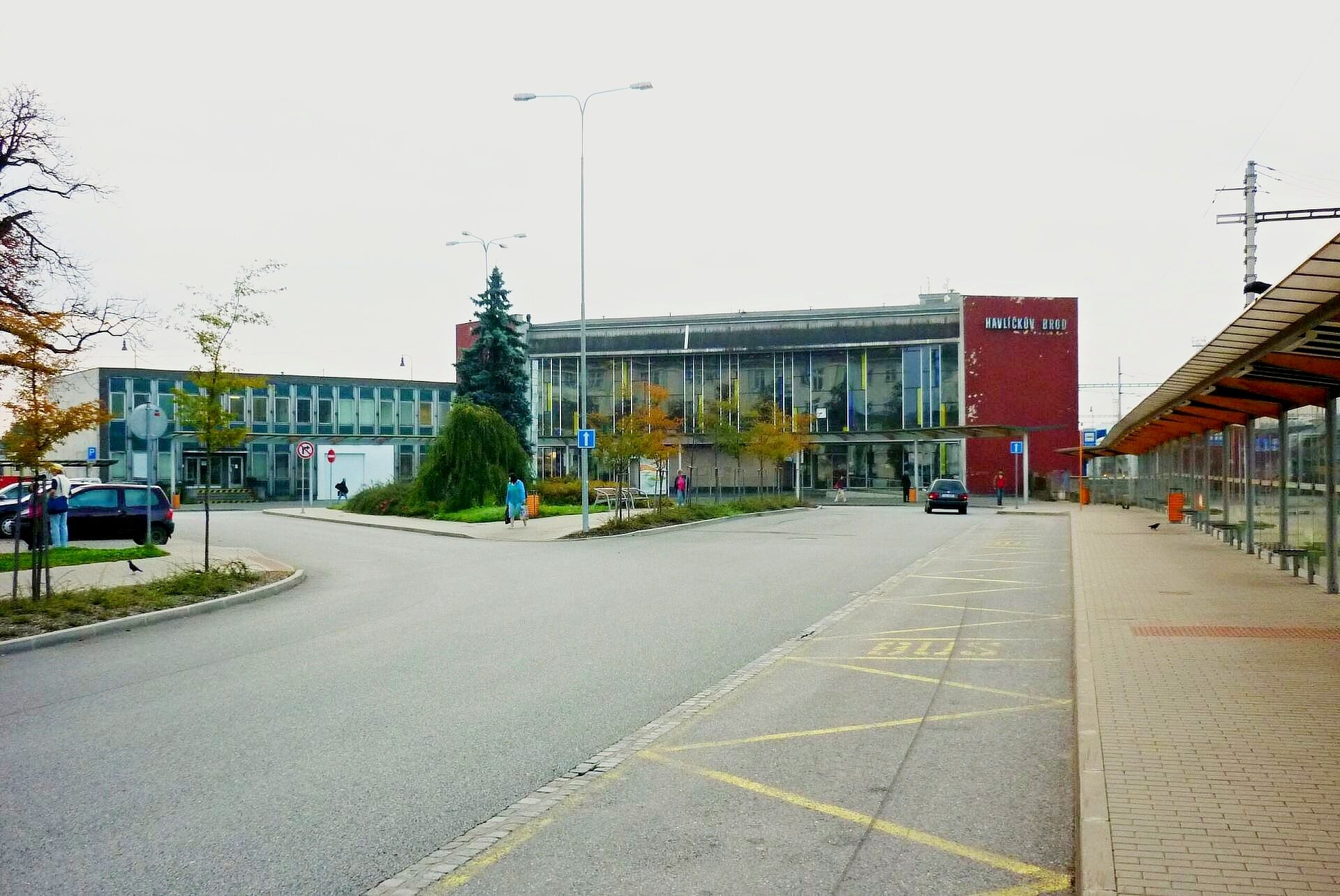 Havlíčkův Brod- nádraží ČD